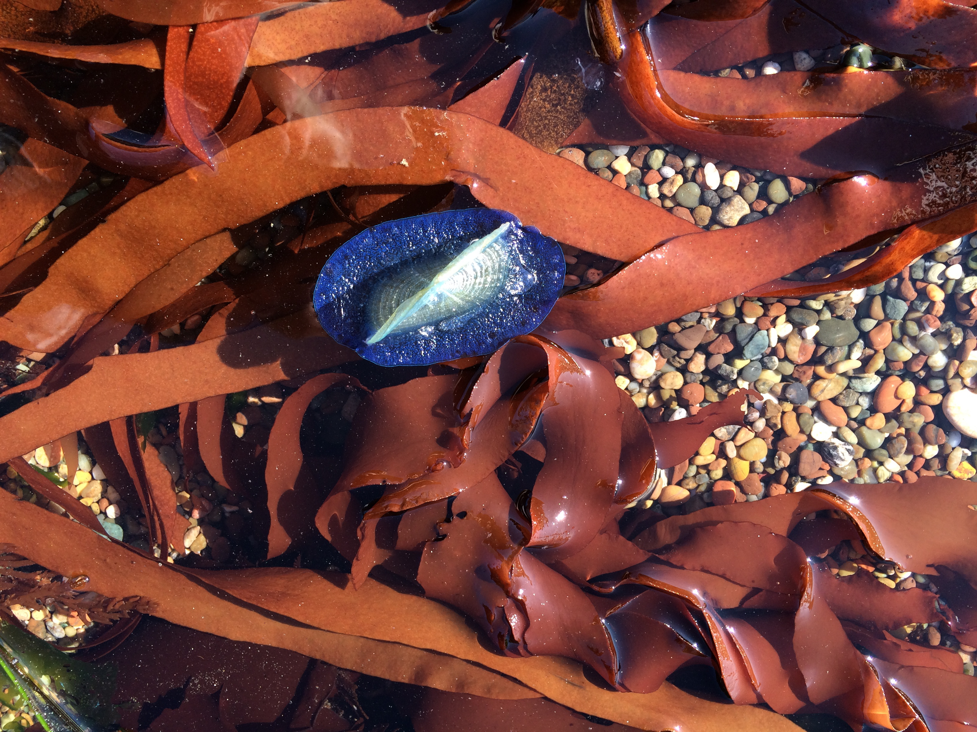 Velella velella, Blue sailor. About 1.5 inches long. On Palmaria palmata, Dulse, I'm pretty sure.